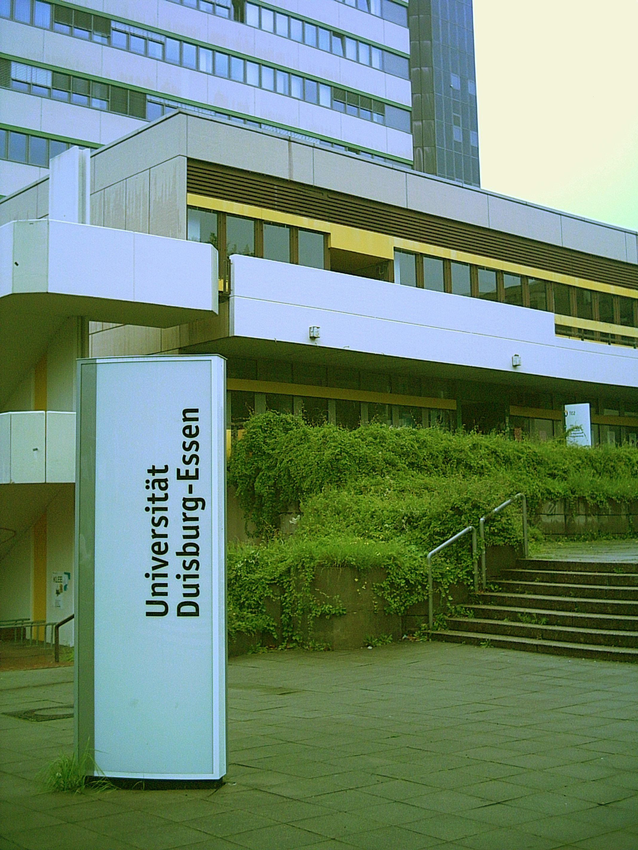 Universität Duisburg-Essen, Standort Essen